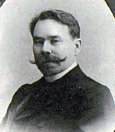 Николай Владимирович Мефодиев (1869, Архангельская губерния — после 1927) — врач, сельский учитель, депутат III Государственной думы от Архангельской губернии (1907—1912).